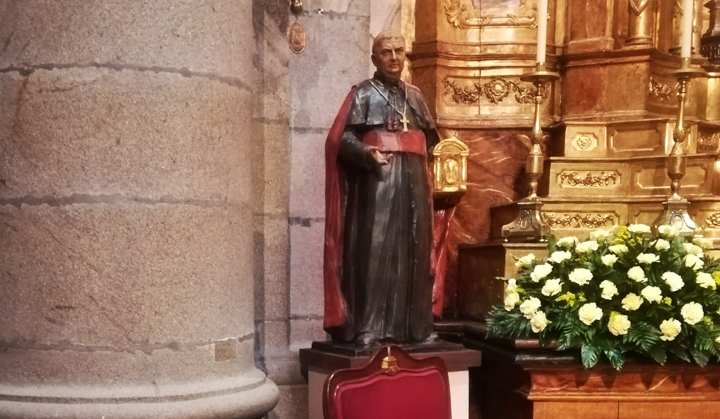 San Manuel González. Capilla del Sagrario de la Catedral de Santiago de Compostela. Provincia de La Coruña. Galicia. España.